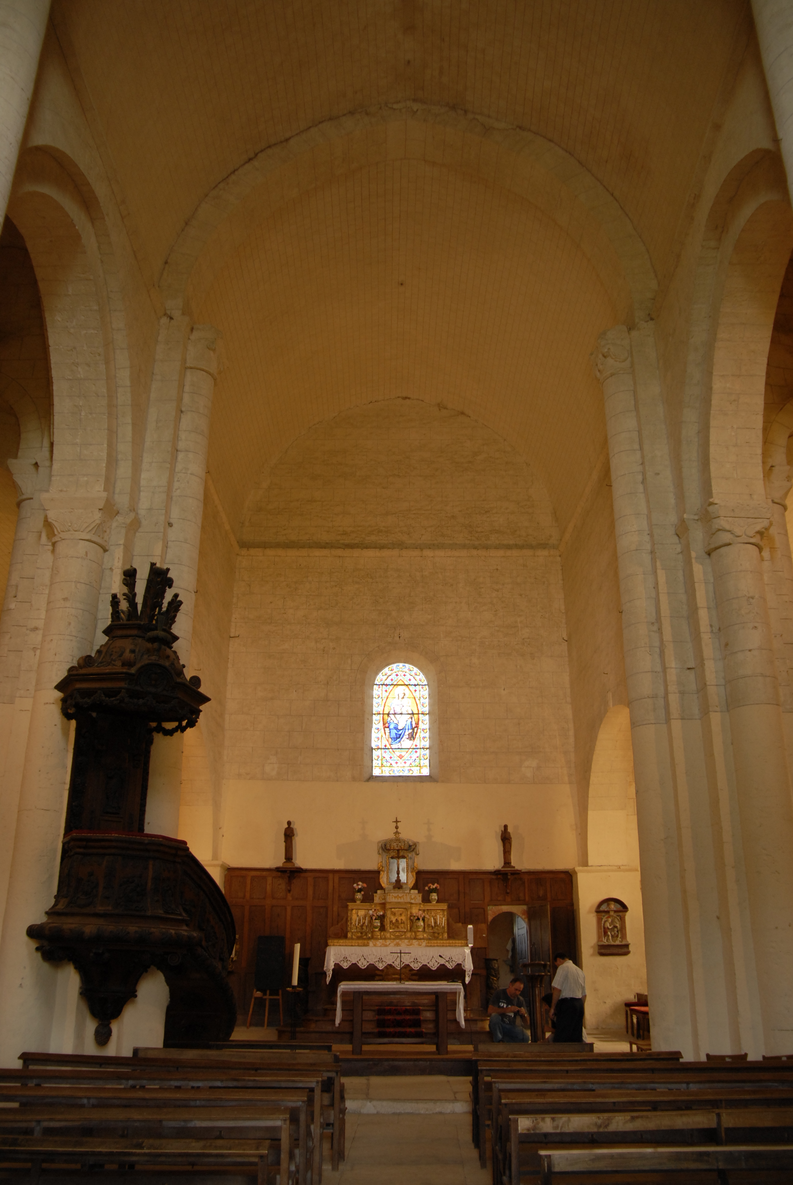 Château-Larcher, Mittelschiff, Joch 3, Verschlusswand des Chors